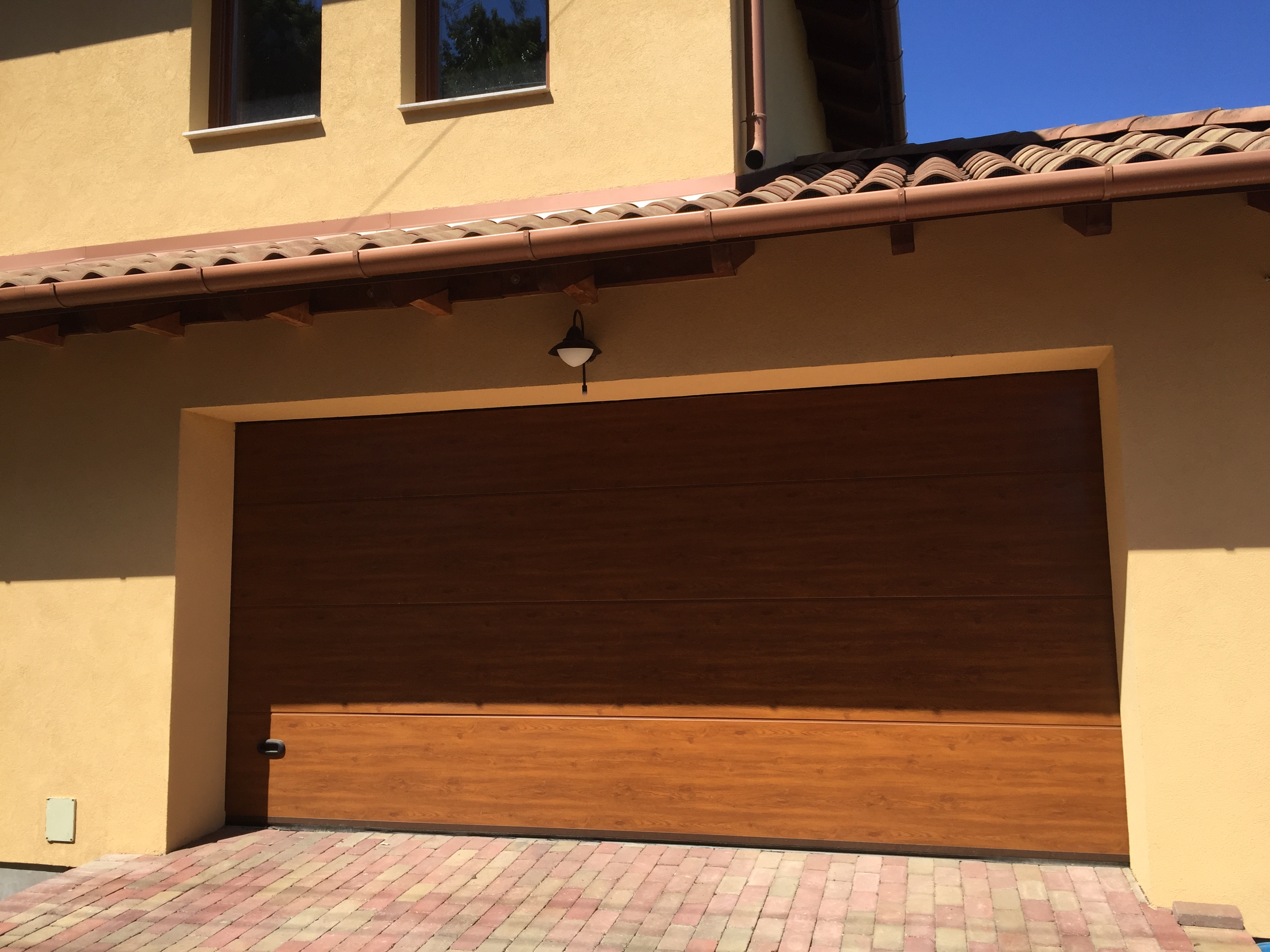 Kling lakossági garázsajtó